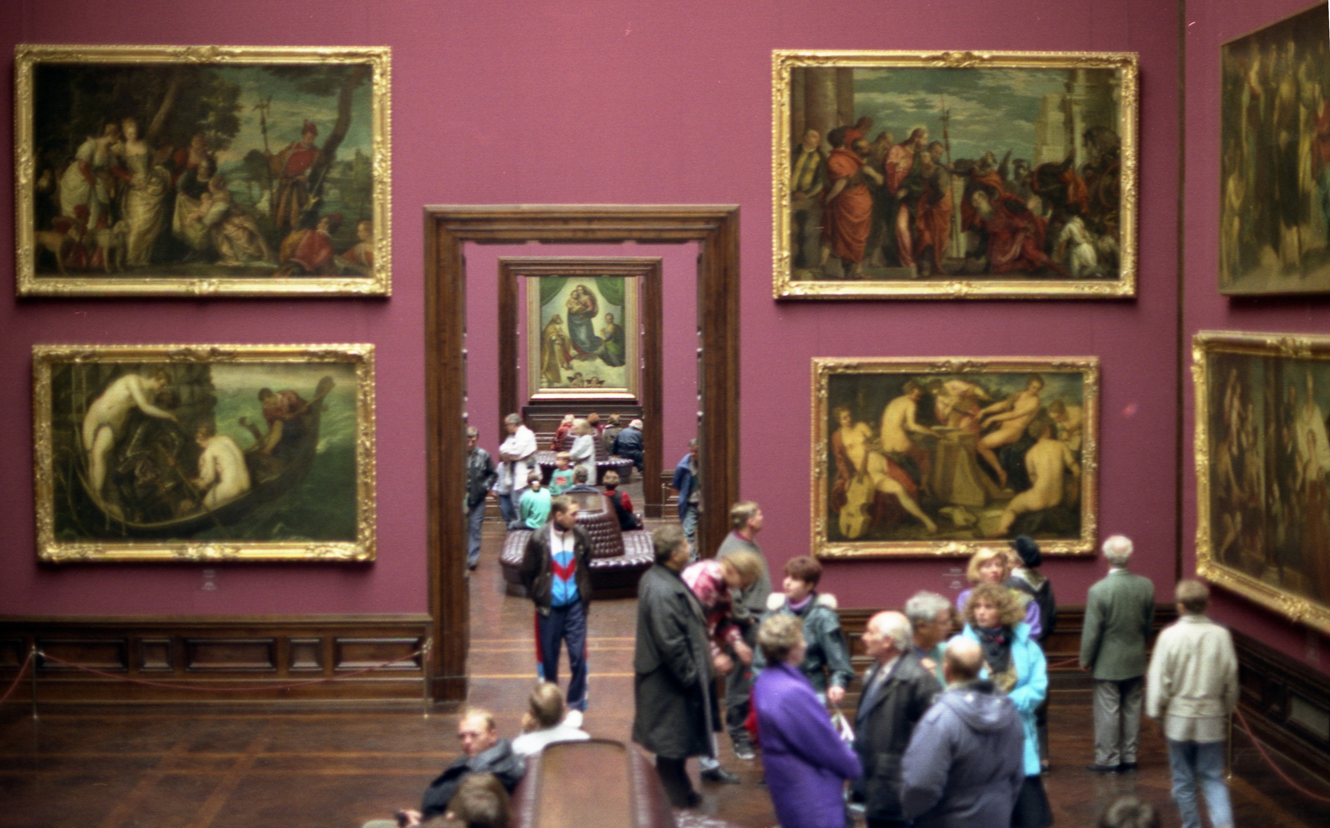 Im Innern der Gemäldegalerie, im Hintergrund die Sixtinische Madonna